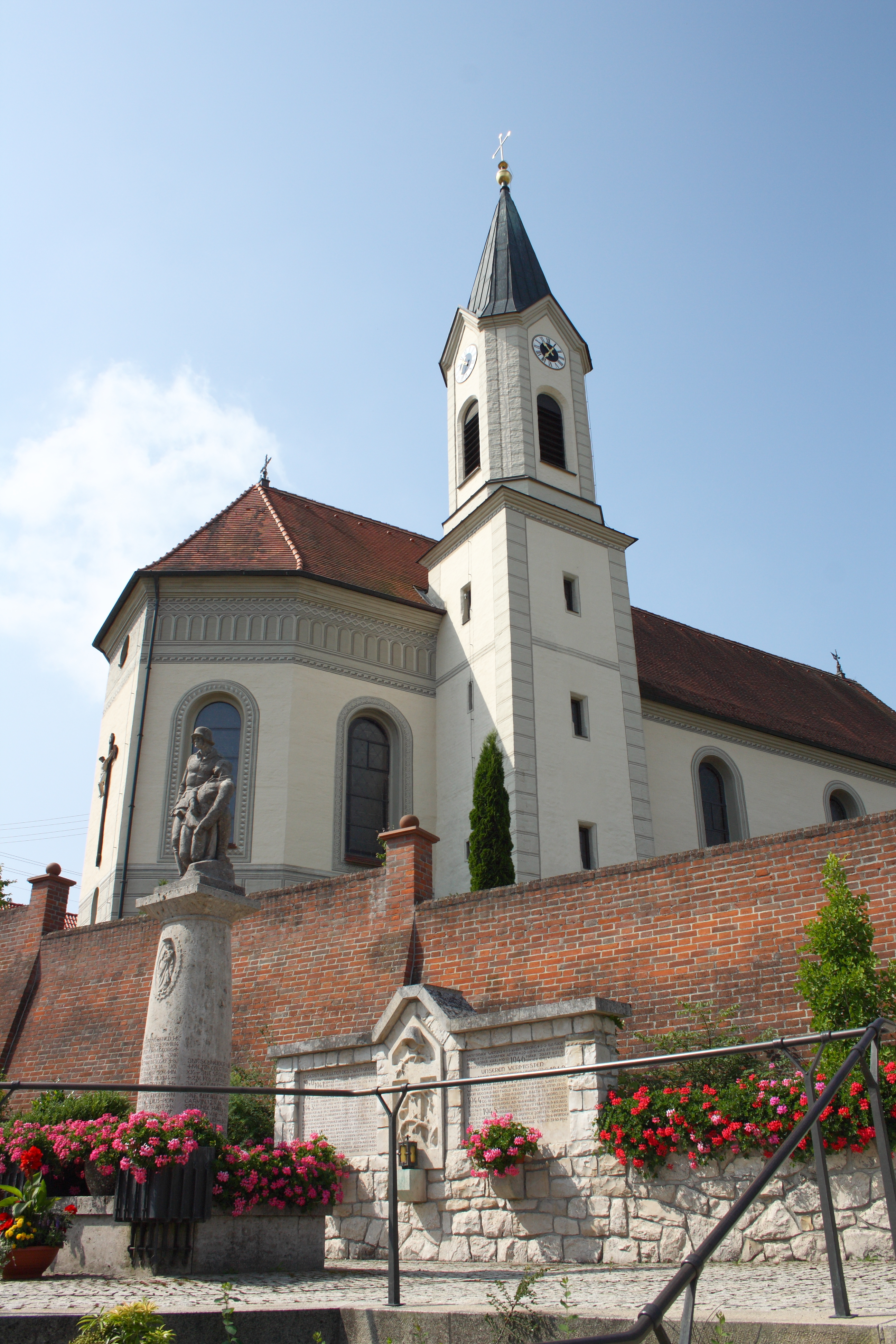 katholische Pfarrkirche St. Martin in Gundremmingen